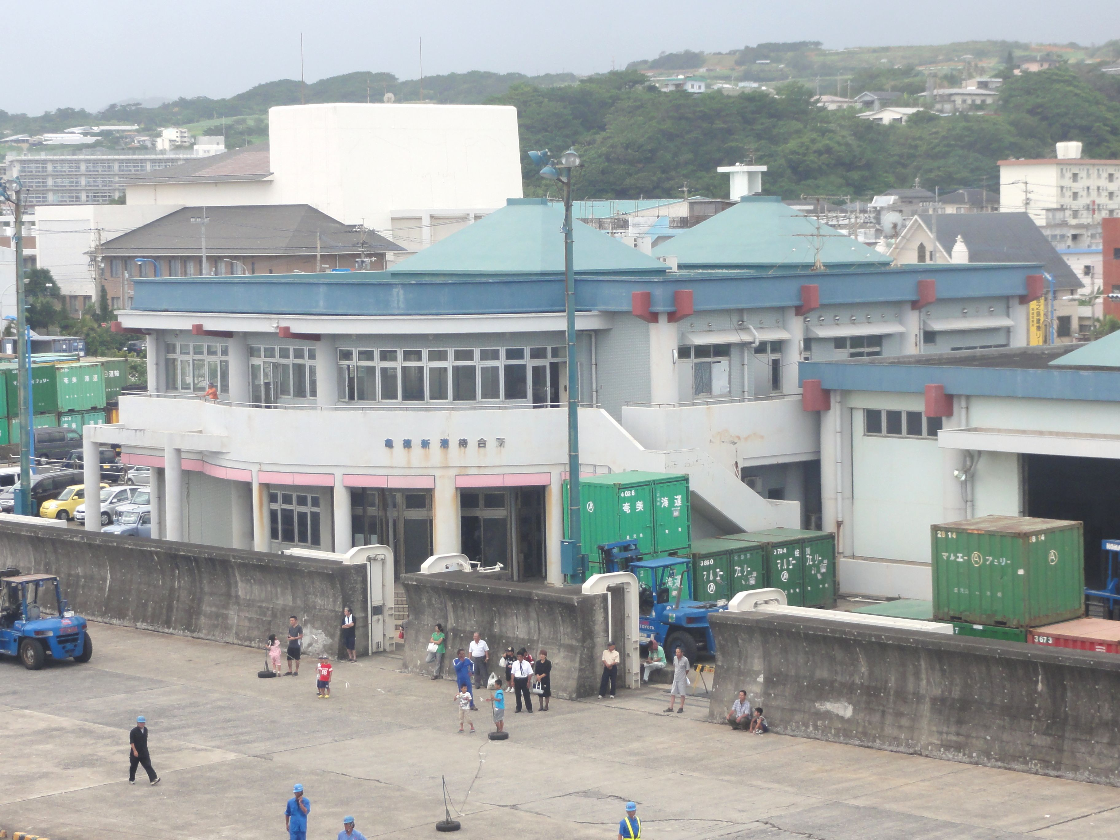 亀徳新港 フェリー待合室